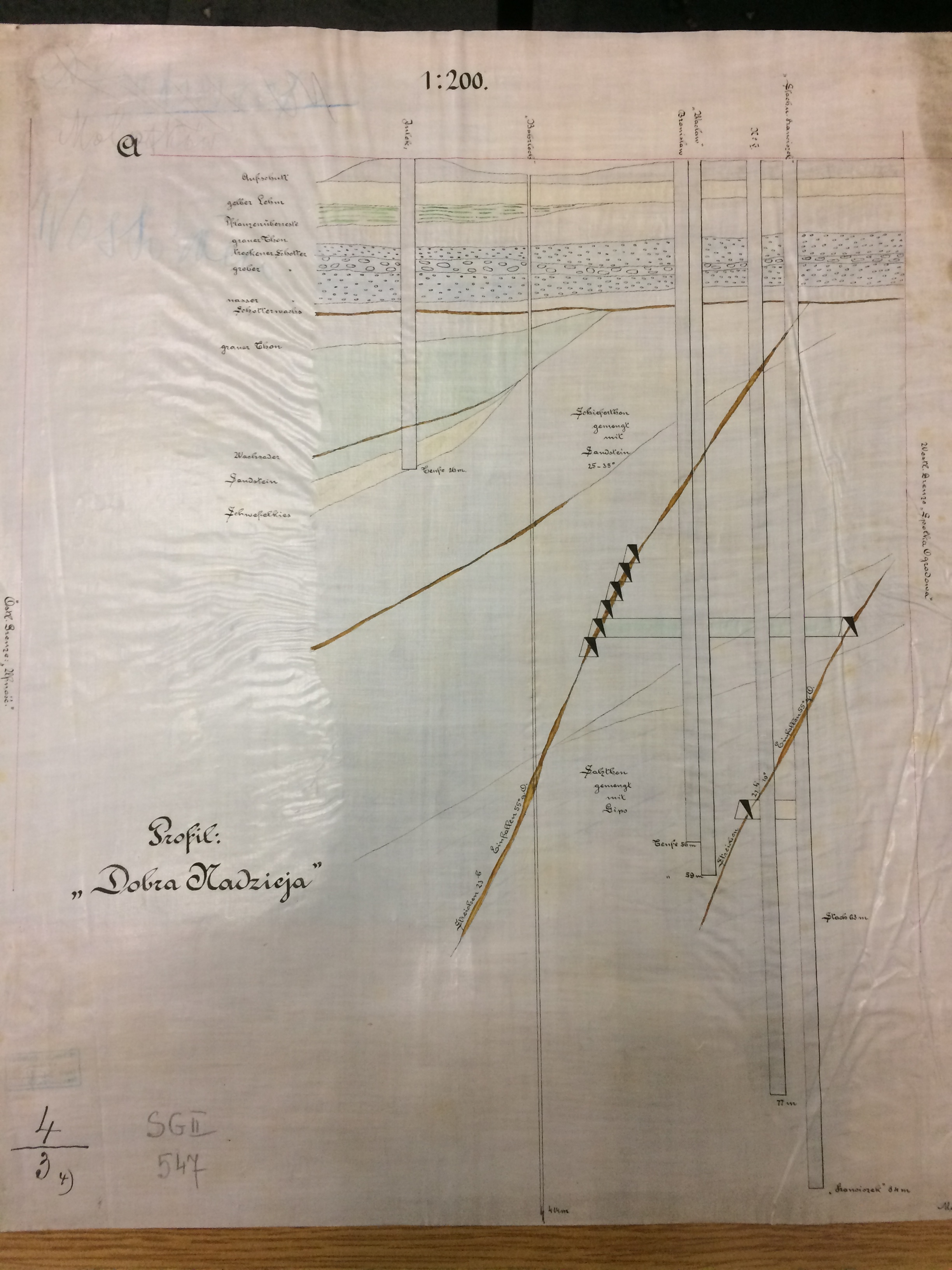 Профіль озокеритної копальні "Добра Надія" в с. Молодків, 1898р.